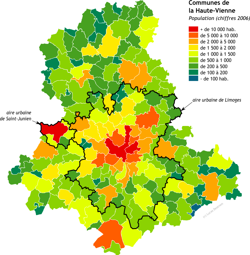 Carte des communes de la Haute-Vienne, population 2006